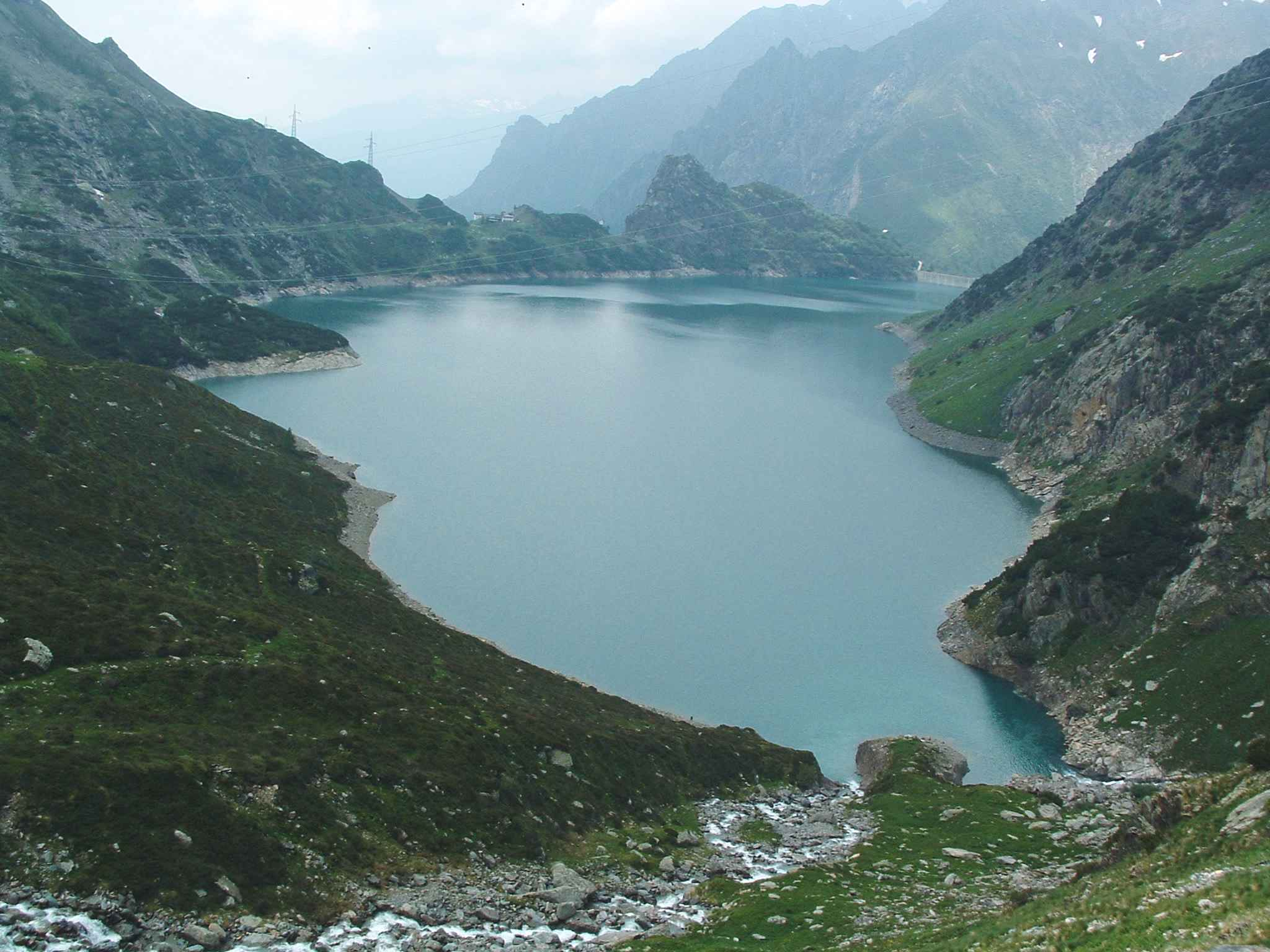 fatta da me